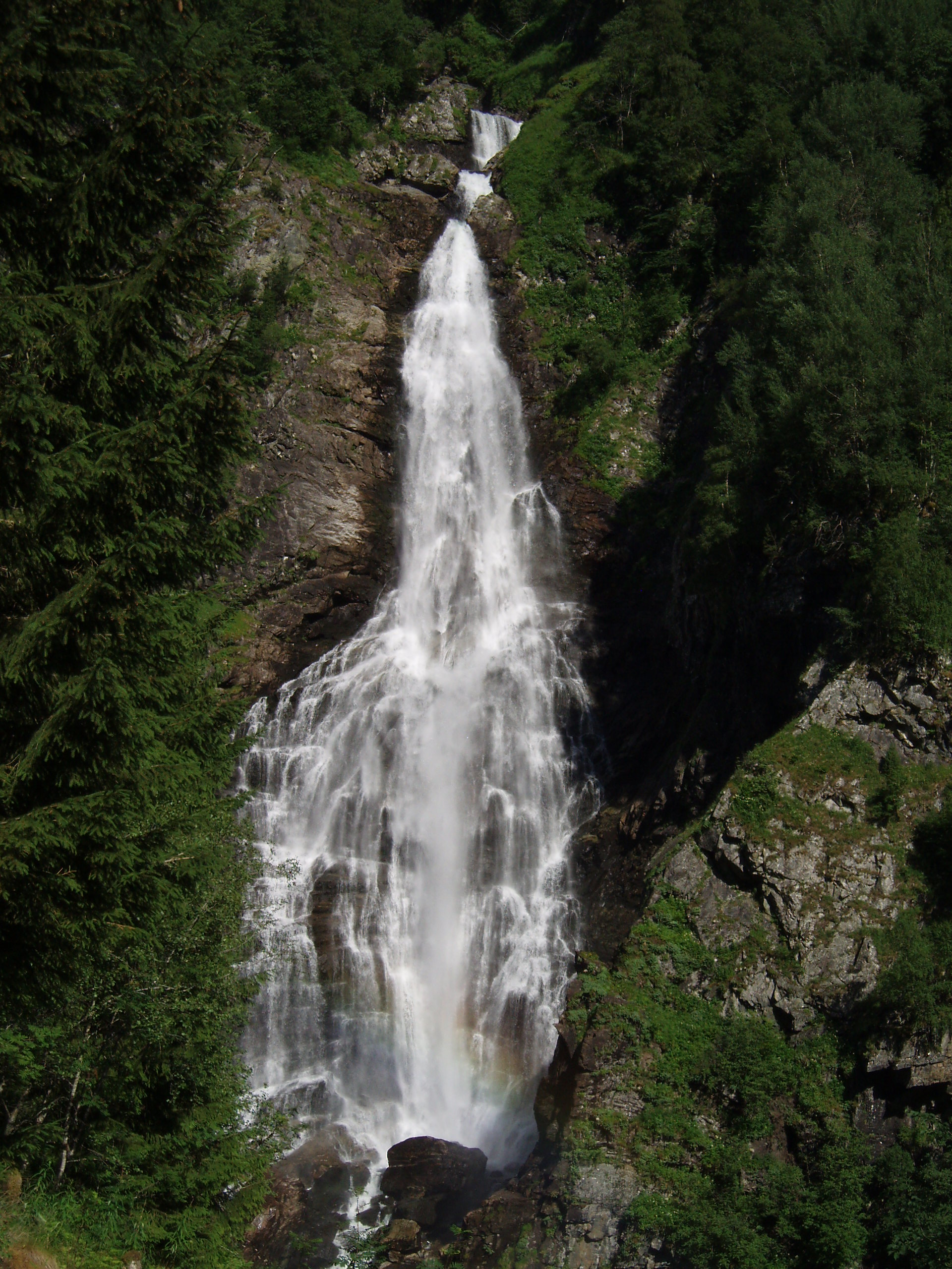 Svilefossen near Stalheim in Voss, Norway.